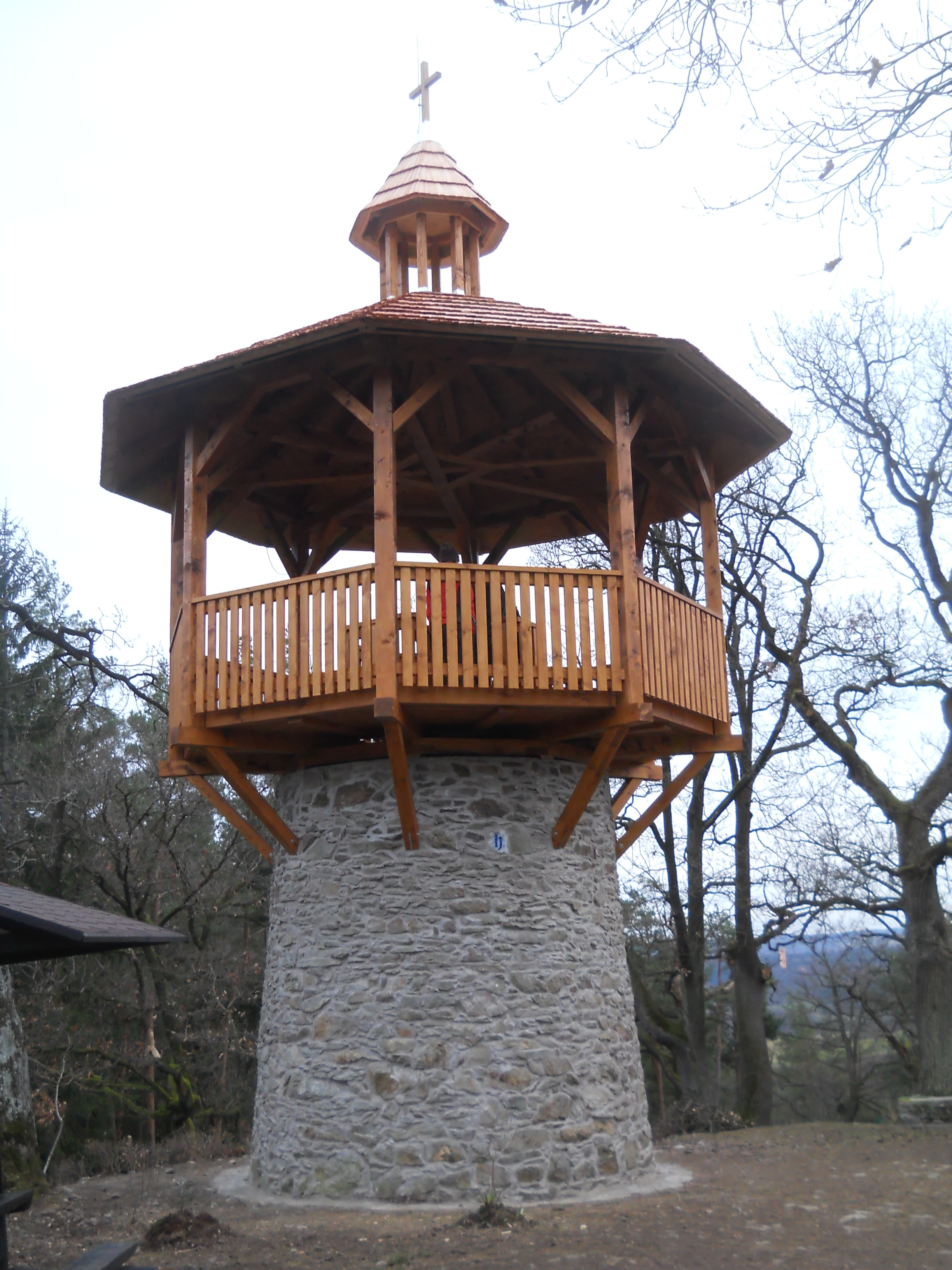 Rozhledna Na Chlumu ve Slatiňanech